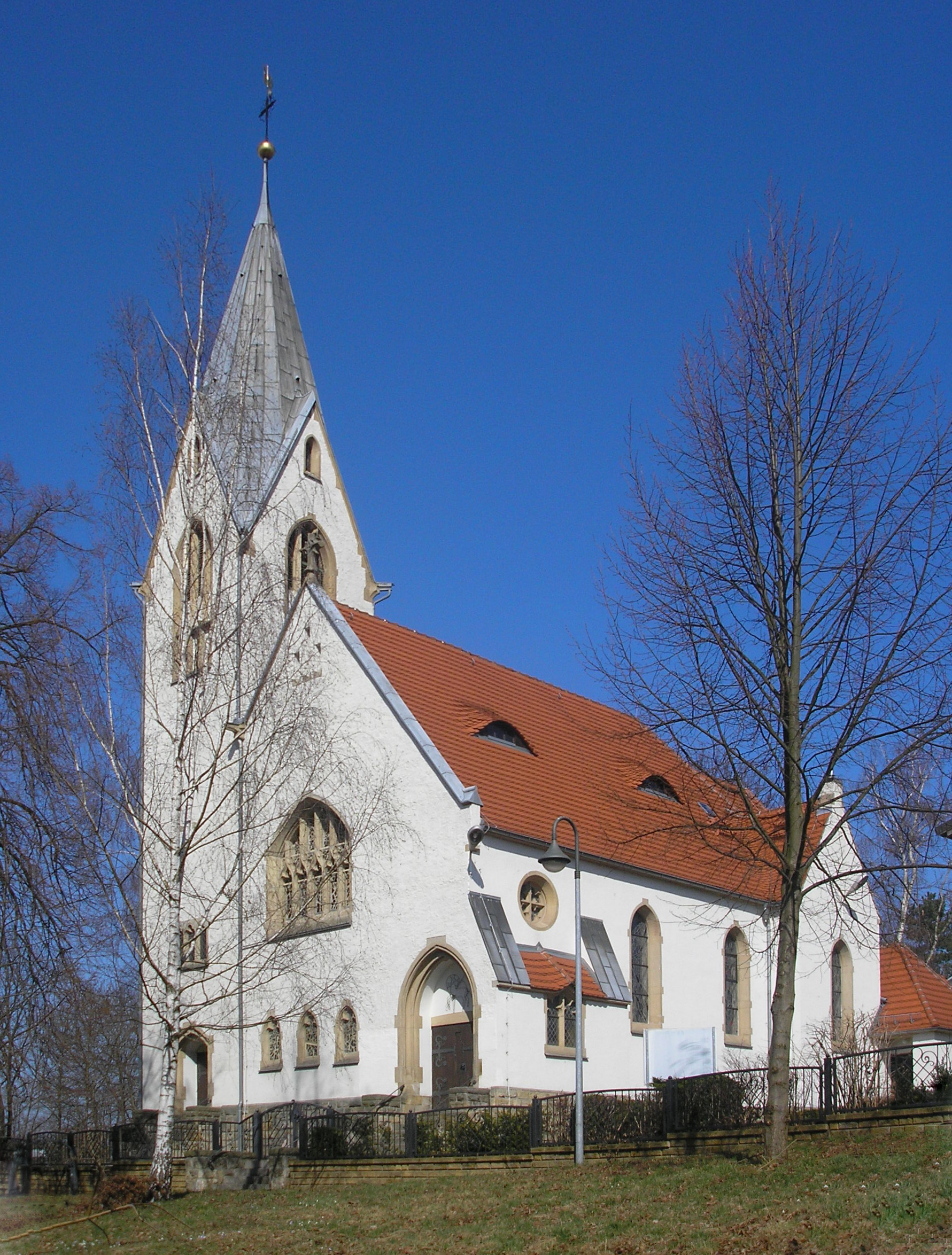 Die katholische Kirche in Schmölln (Thüringen).